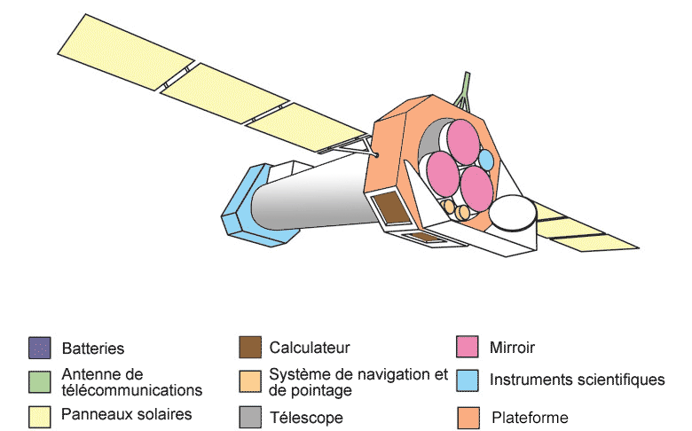 Schéma XMM-Newton avec légende en francais